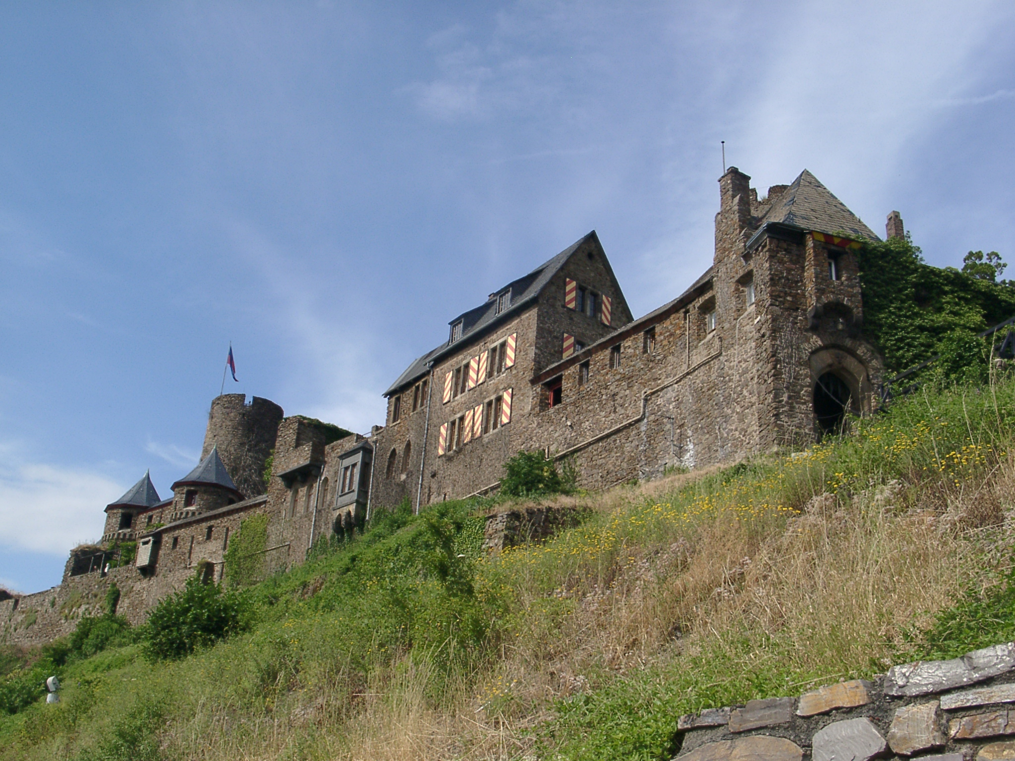 Burg Thurant, north-western aspect